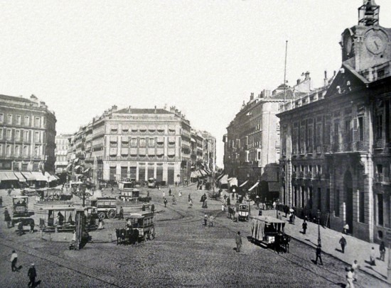 Puerta del Sol (1885) Tras su reforma